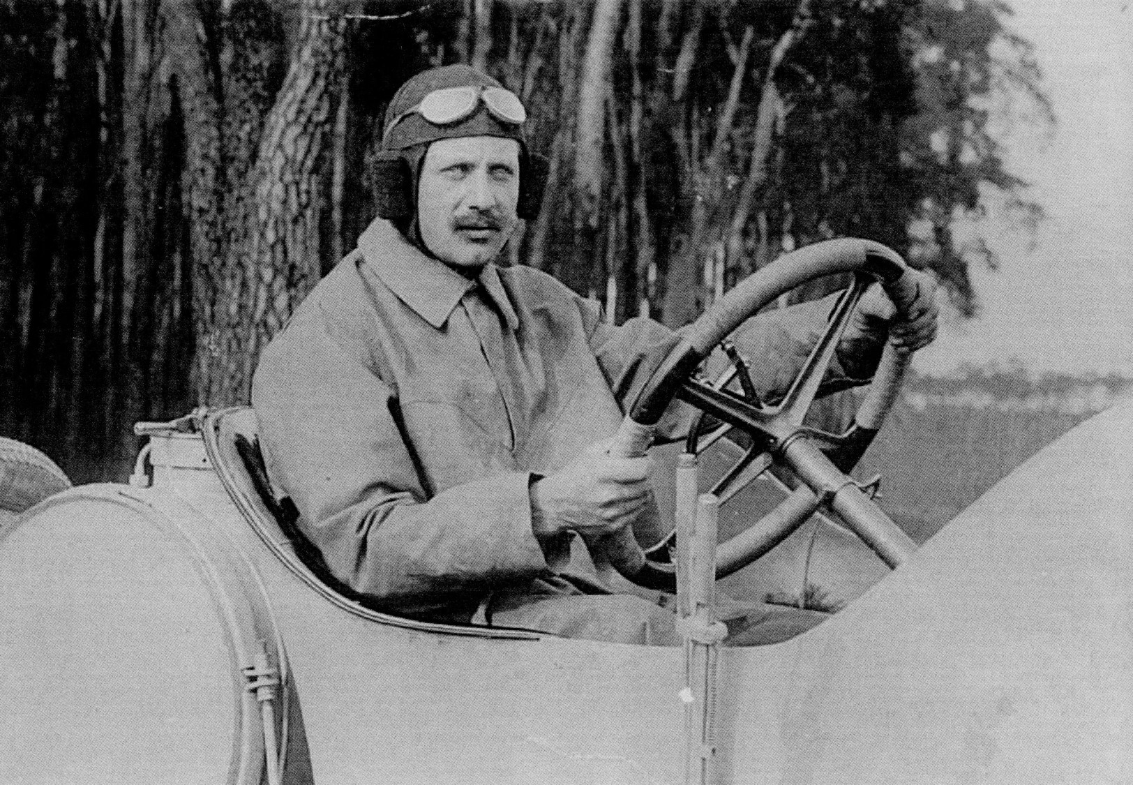 Franz Heim als Werksfahrer von Benz am Steuer eines Prinz Heinrich Benz 1910. Der Wagen wurde für das Vanderbilt Rennen in den USA vorbereitet. Das Foto stammt offensichtlich noch aus Mannheim.